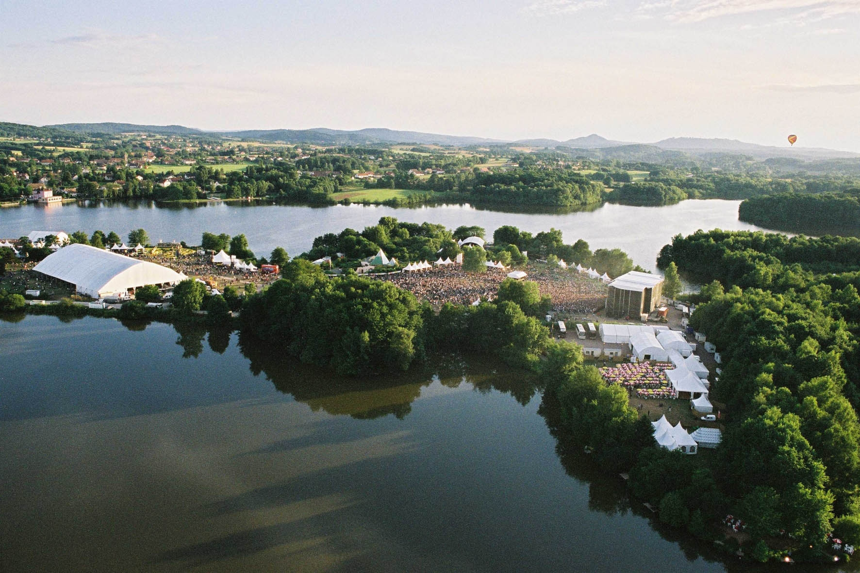 Une vue aérienne du site des Eurockeennes de Belfort, sur le site du Malsaucy.